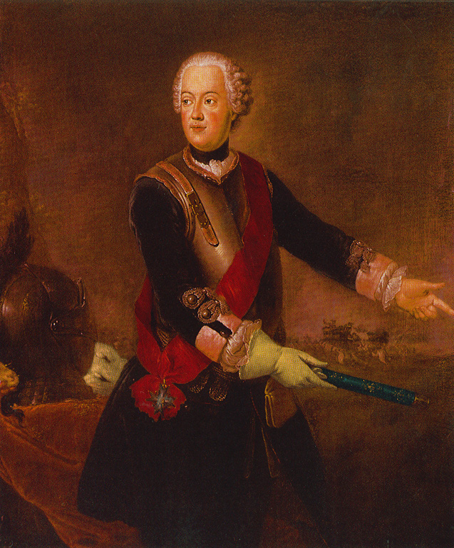 Kniestück